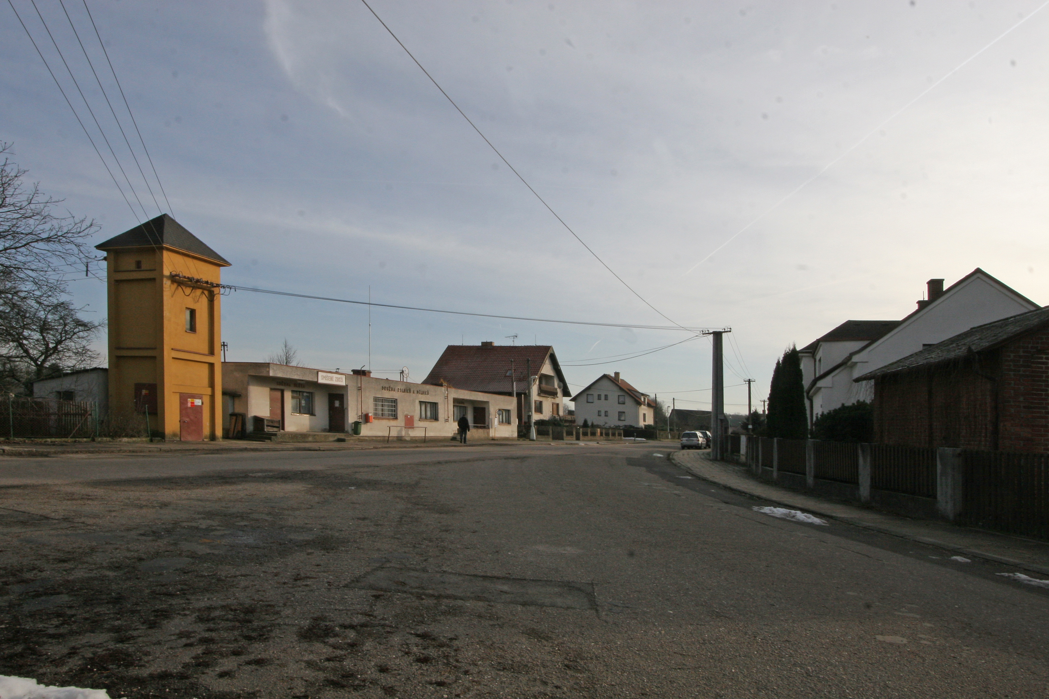 Tůně prodejna